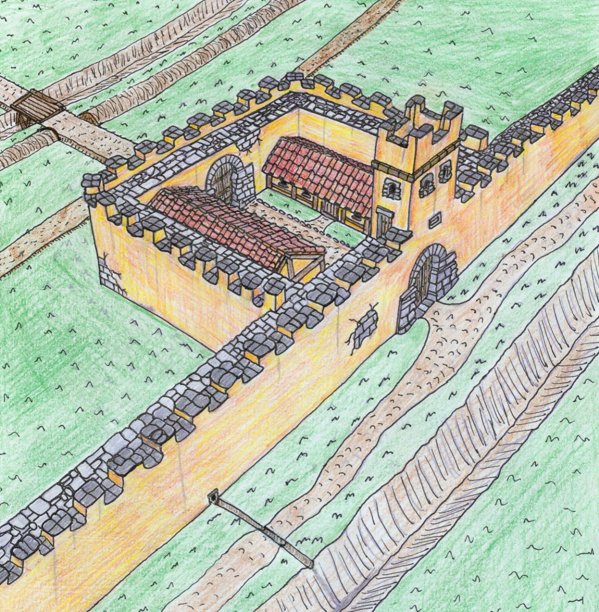 Rekonstruktionsversuch des Meilenkastells 37 (Housesteads) am Hadrianswall